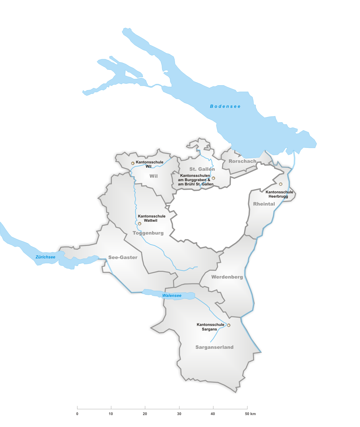 Kantonsschulen des Kanton St. Gallen